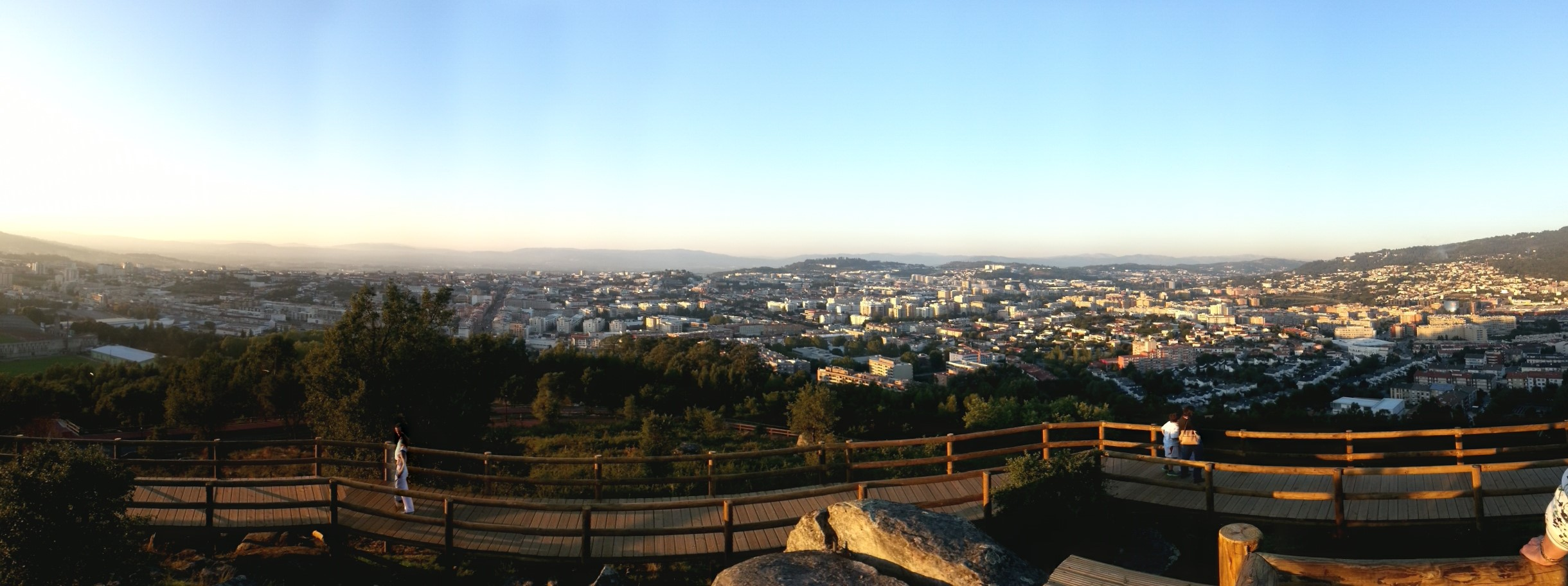 Vista panorâmica do centro de Braga do topo do monte Picoto